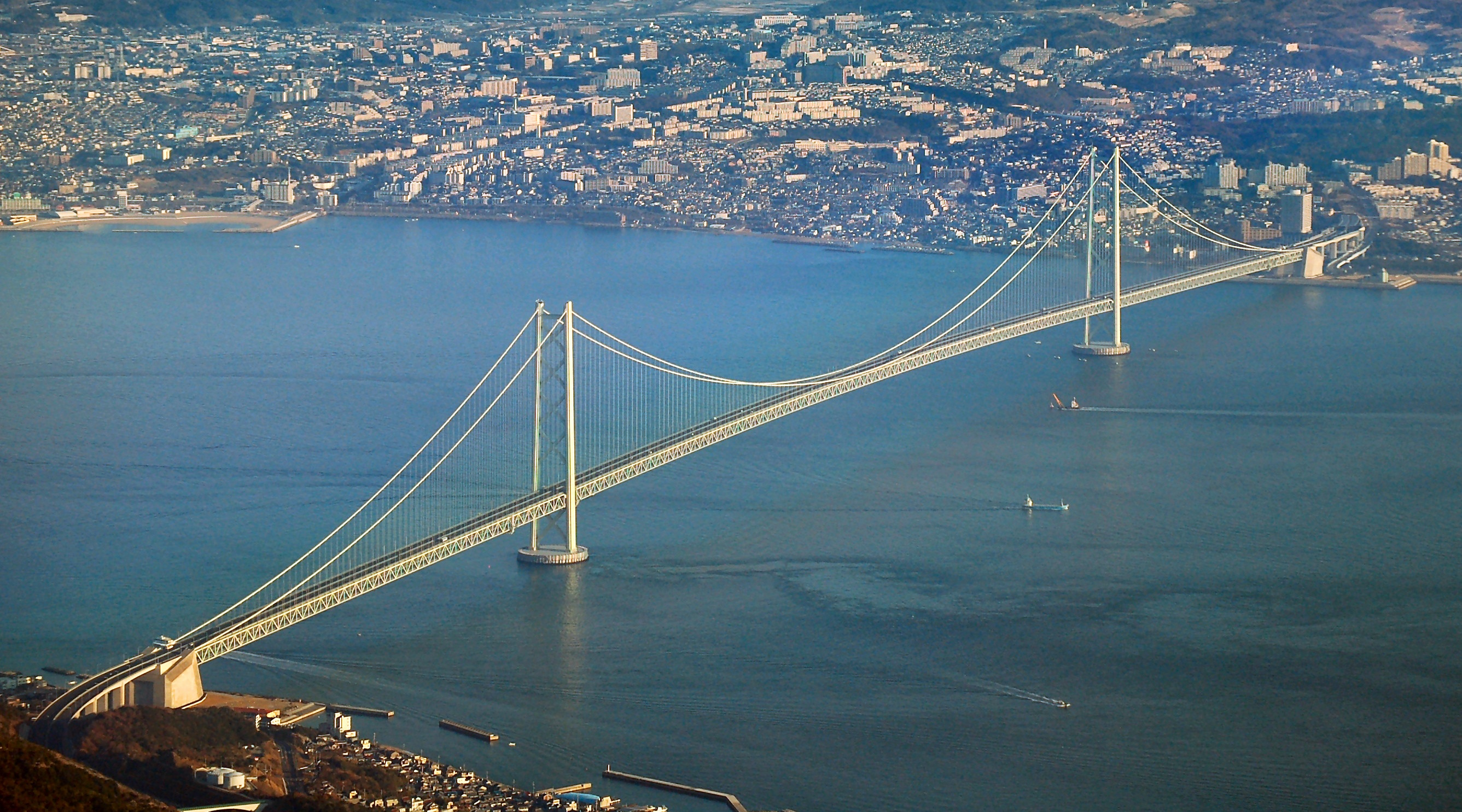 Az Akashi Kaikjo híd Japánban. A világ legnagyobb támaszközű hídja. Az eredeti kivágata.